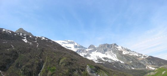 Massif de la Vanoise - Le Grand Bec. Panorama réalisé à partir de photos prises le 30 Mai 2004 au-dessus de Champagny-le-Haut avec un orientation Nord/Nord-Est